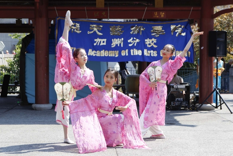 2011年紐約修煉心得交流會風雨無阻 法輪大法創始人蒞臨講法